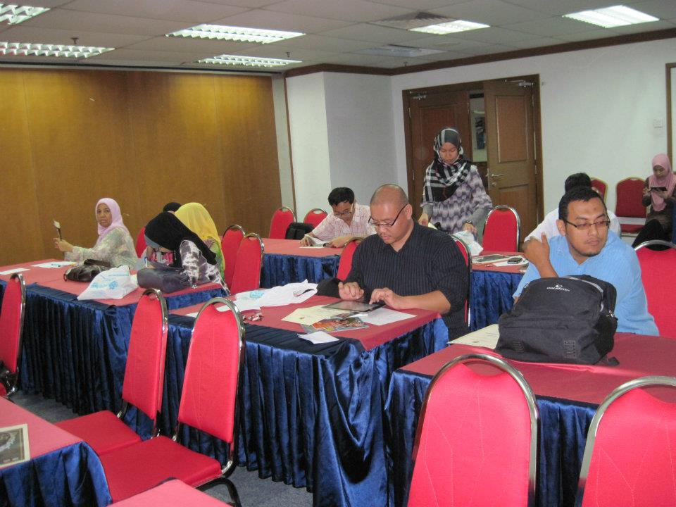 Para peserta yang hadir dalam bengkel penulisan makalah budaya di bangunan Dewan Bahasa dan Pustaka.